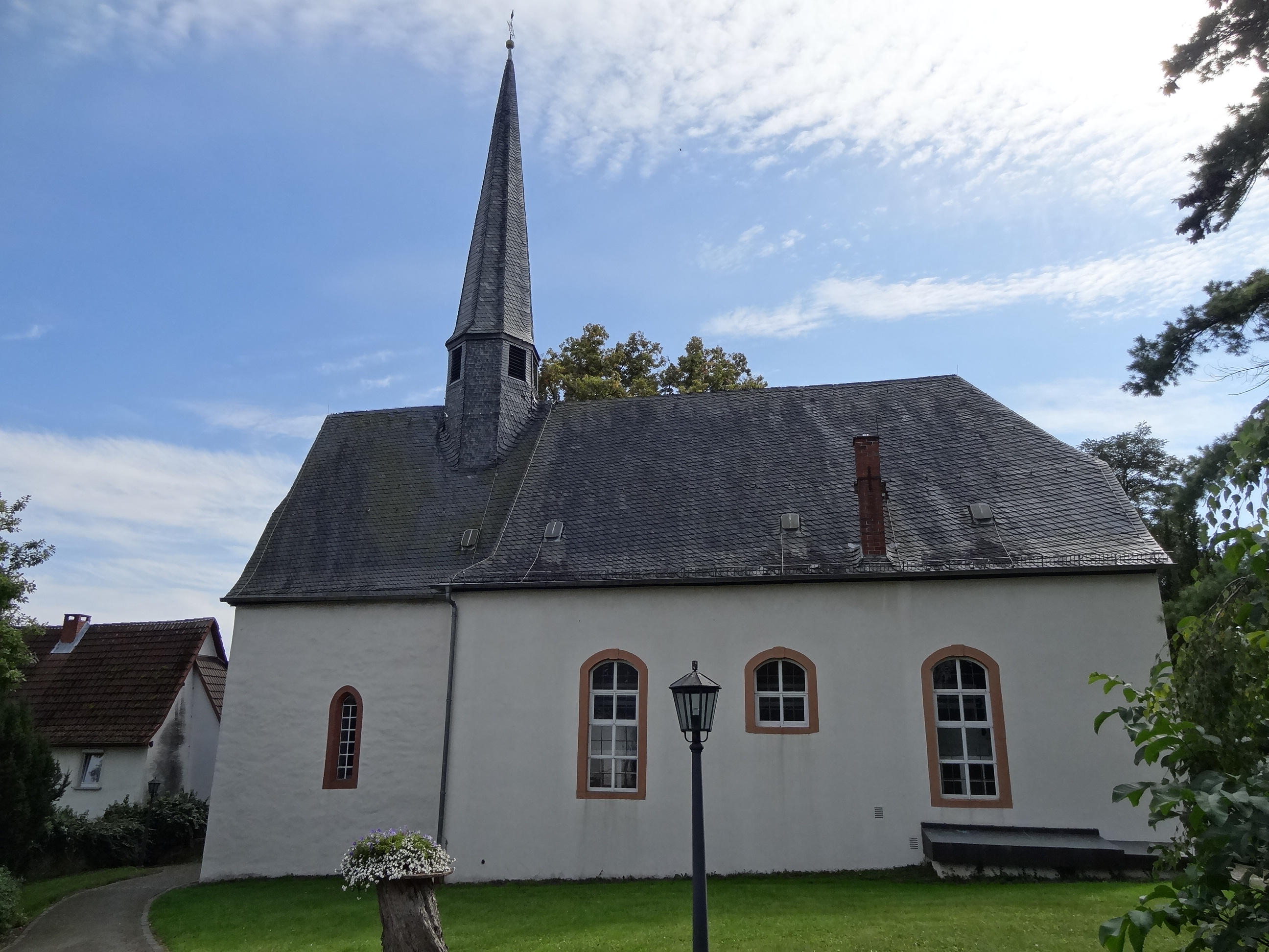 Evangelische Kirche Obbornhofen